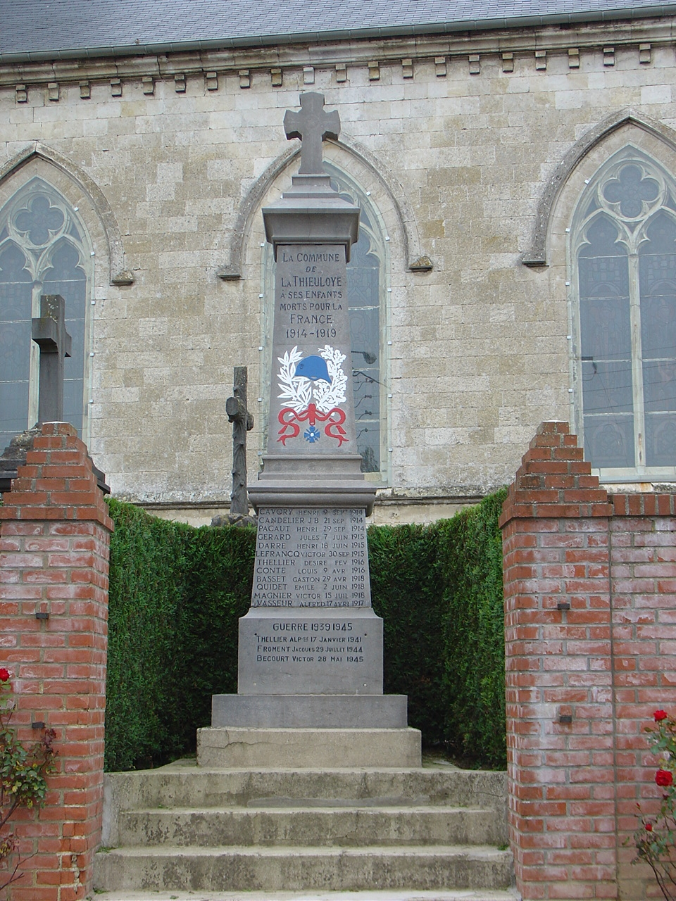 Monument aux morts de La Thieuloye